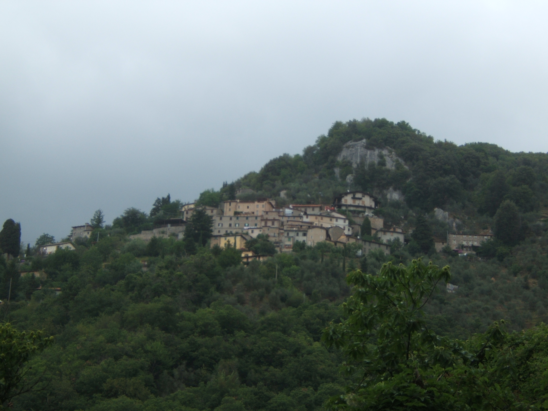 Ansicht von Metato